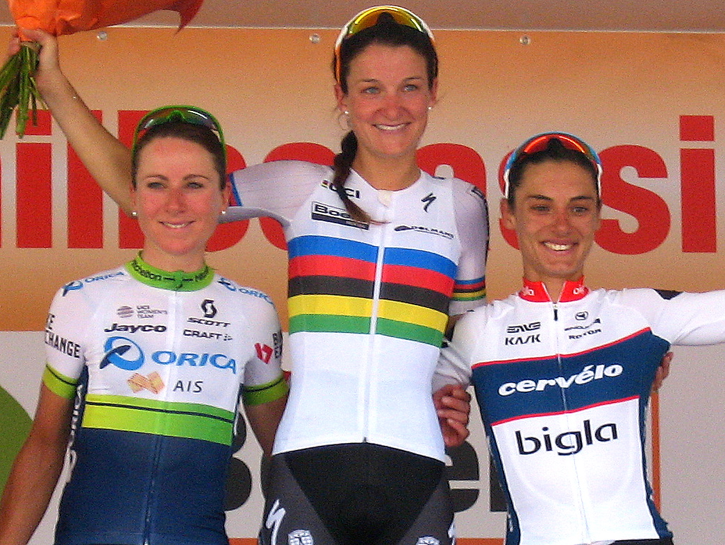 Podium van Holland Hills Classic 2016 1 Lizzie Armitstead 2 Annemiek van Vleuten 3 Ashleigh Moolman